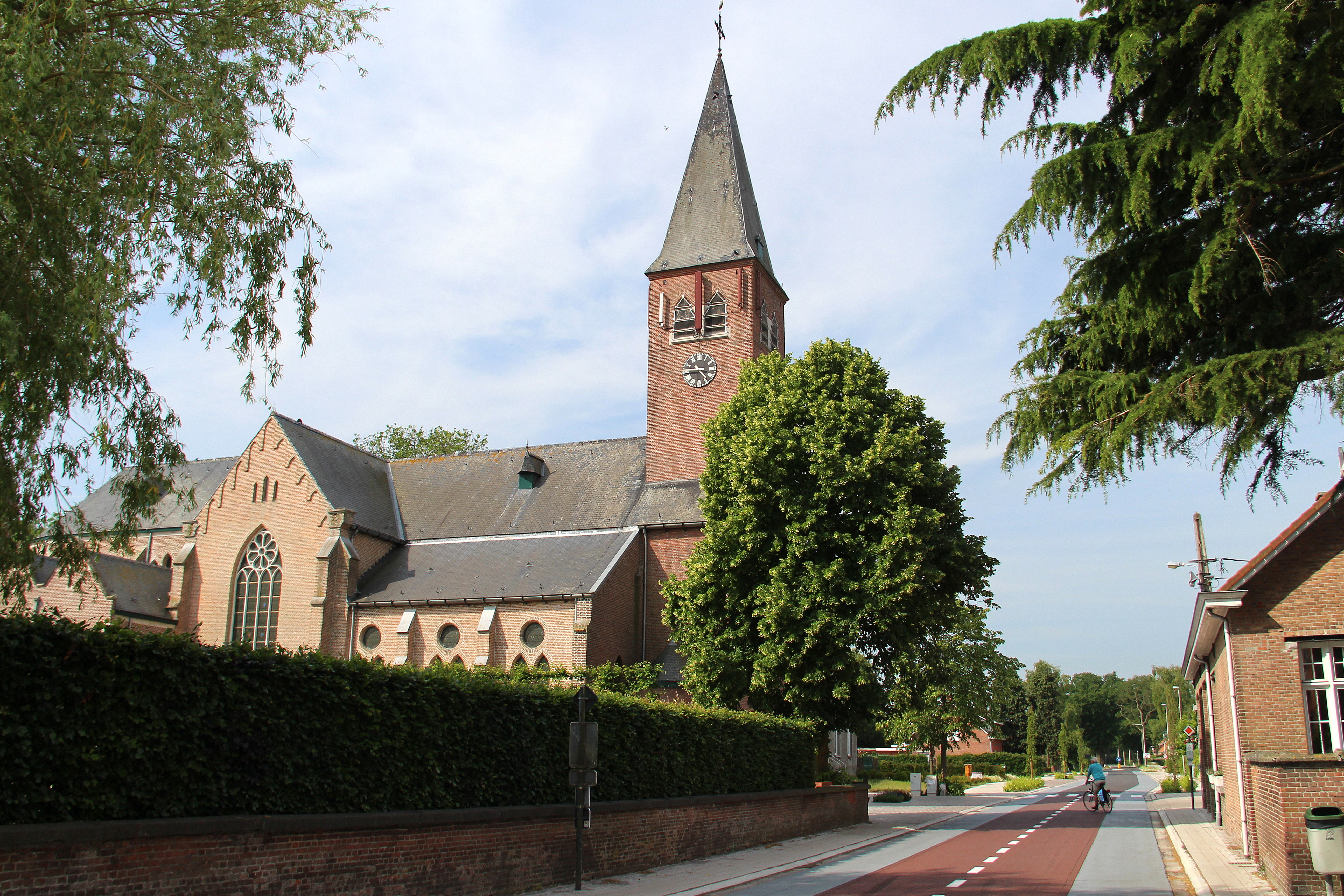 Neogotische kerk met kerkhof aan oostzijde opgetrokken in 1859-1863 naar ontwerp van architect Eugeen Gife, vergroot in 1929-31 naar ontwerp van architect Gustaaf Careels (nieuw koor en transept), beschadigd in 1944 en vrijwel volledig vernieuwd in 1949 naar ontwerp van architect Eduard Van Ballaer (onder andere nieuwe toren).